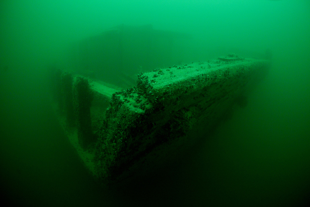 Betty af Bratenvik akterifrån.